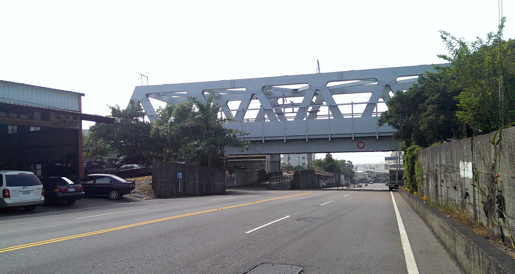 中文（台灣）: 甲后路后里外埔交界處